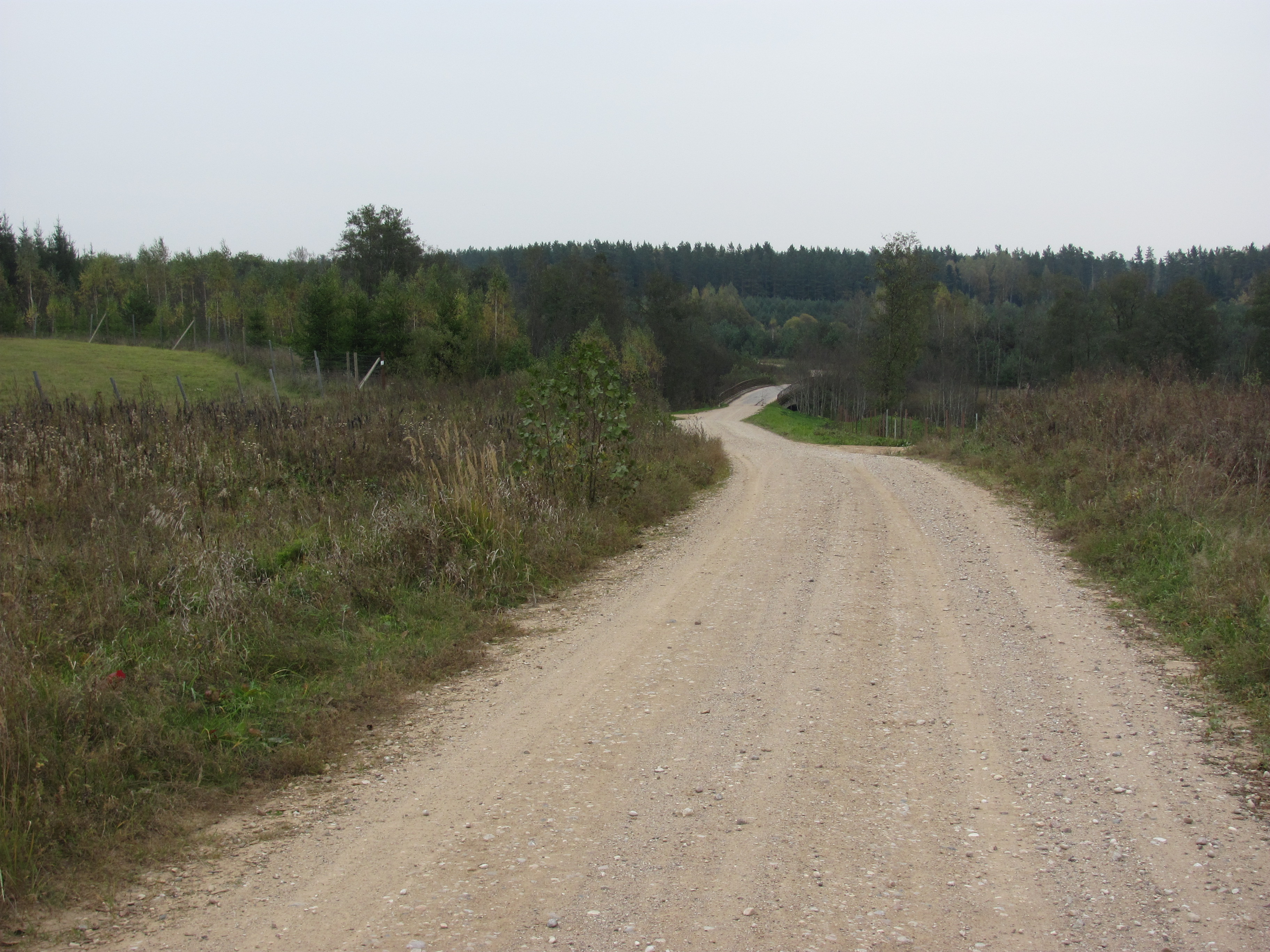 Svėdasų sen., Lithuania